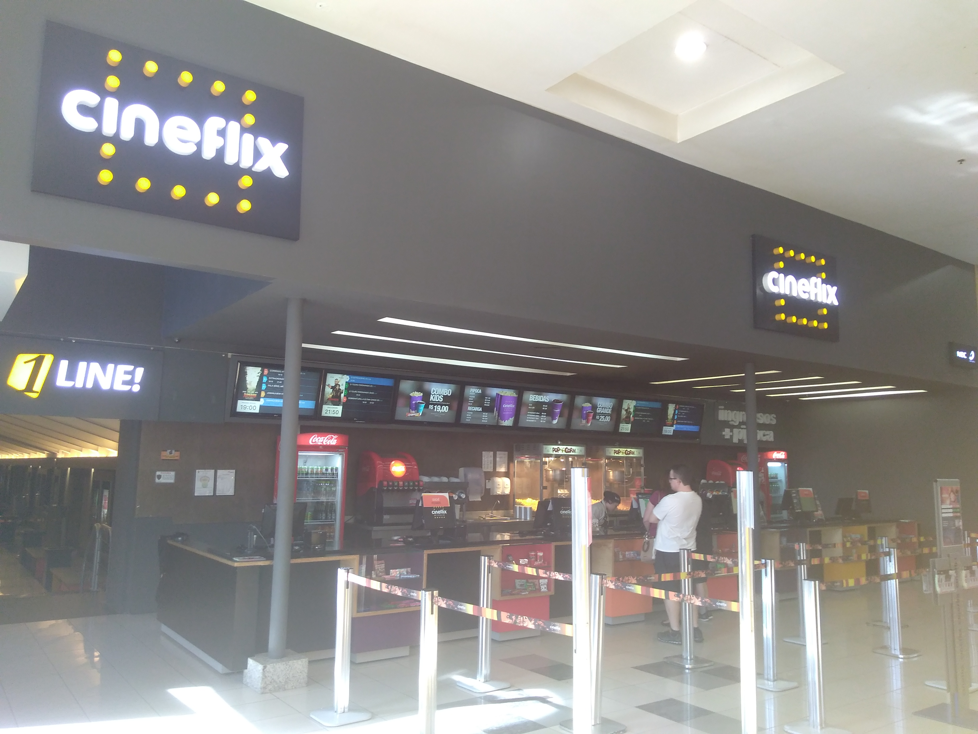 Vista da área externa do Cineflix Shopping Total de Porto Alegre, RS